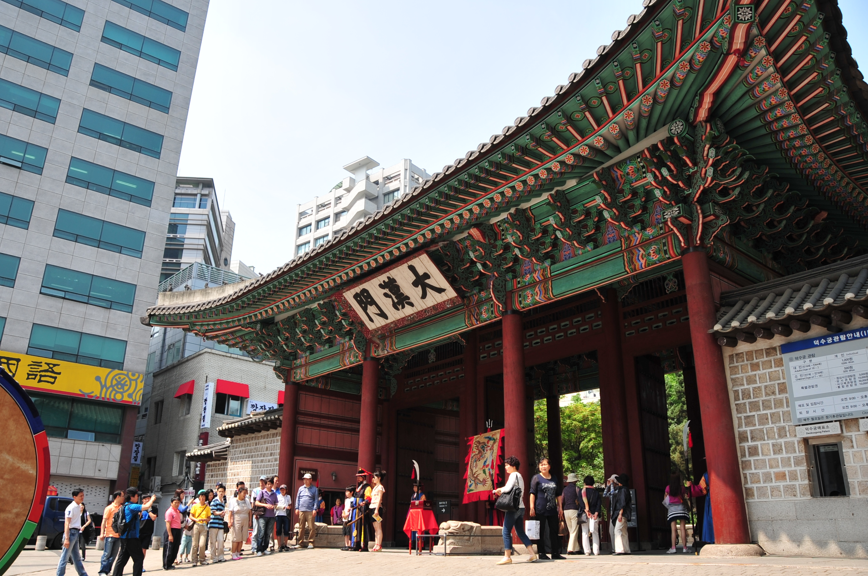 Daehanmun 덕수궁의 정문인 대한문.